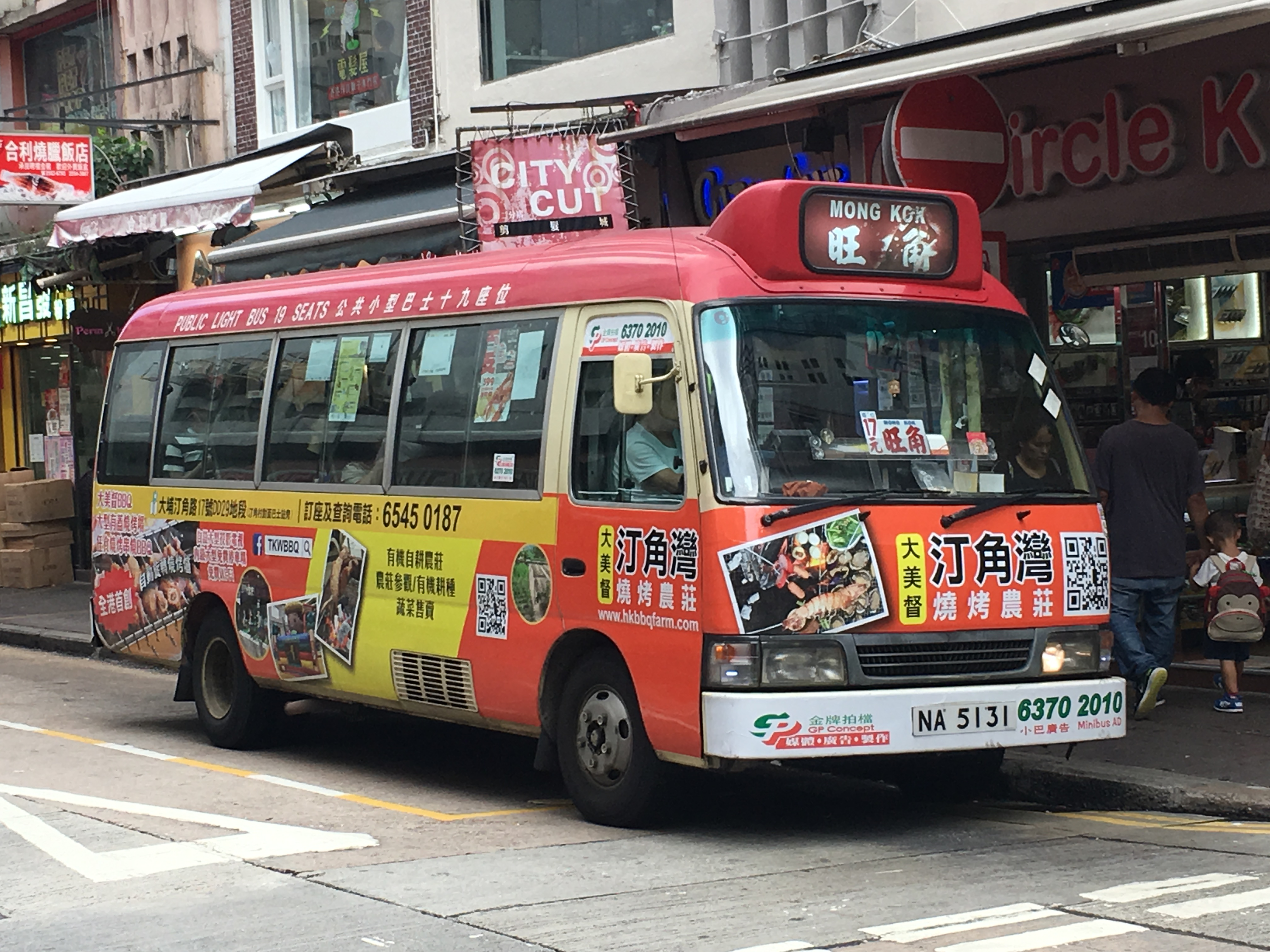 中文（香港）: This photo is taken in Aberdeen.